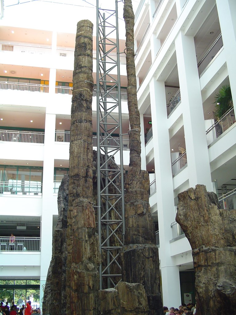 versteinerter Wald in Chemnitz